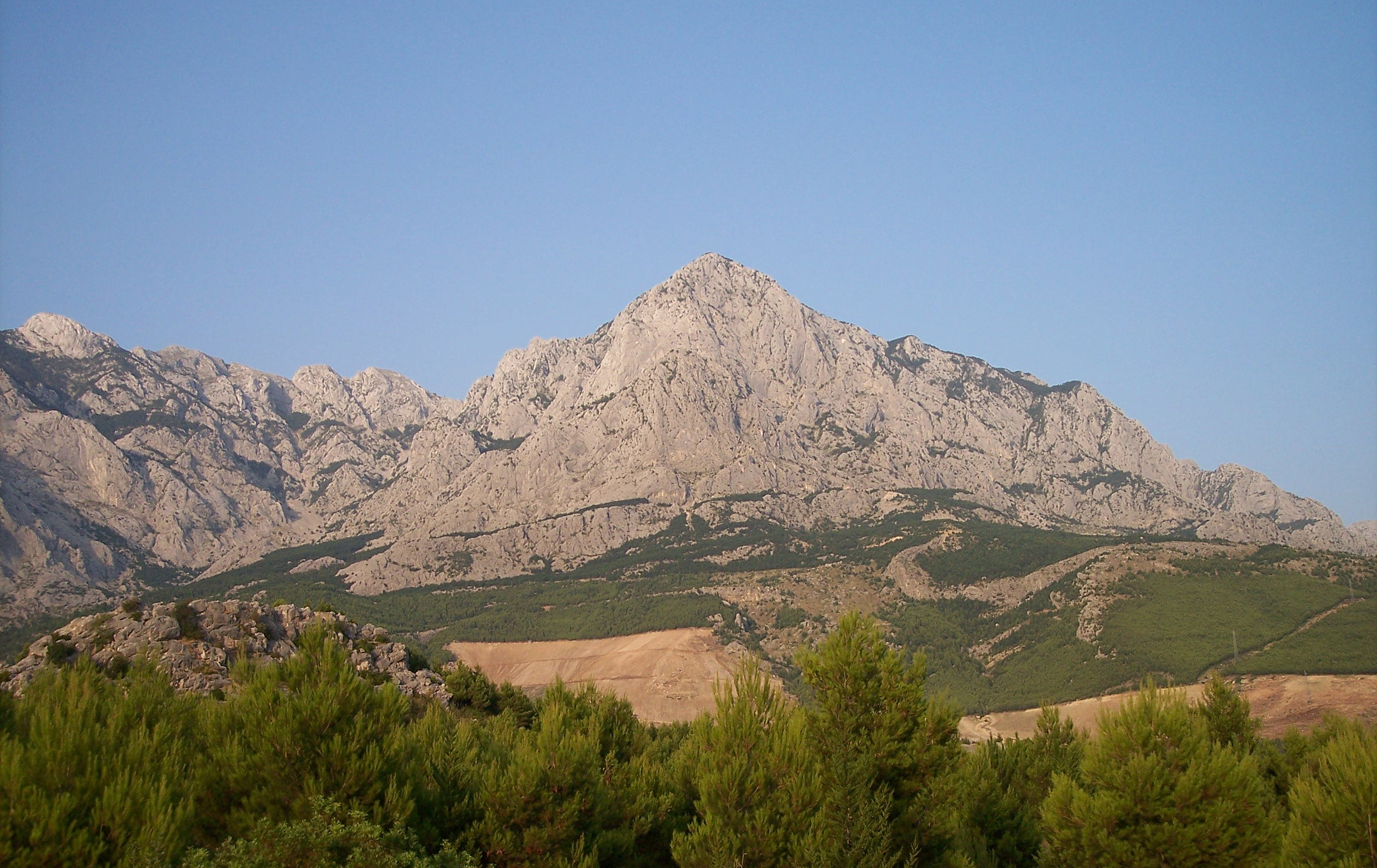 Mountain Biokovo (1762 m) at Baška Voda (Croatia)